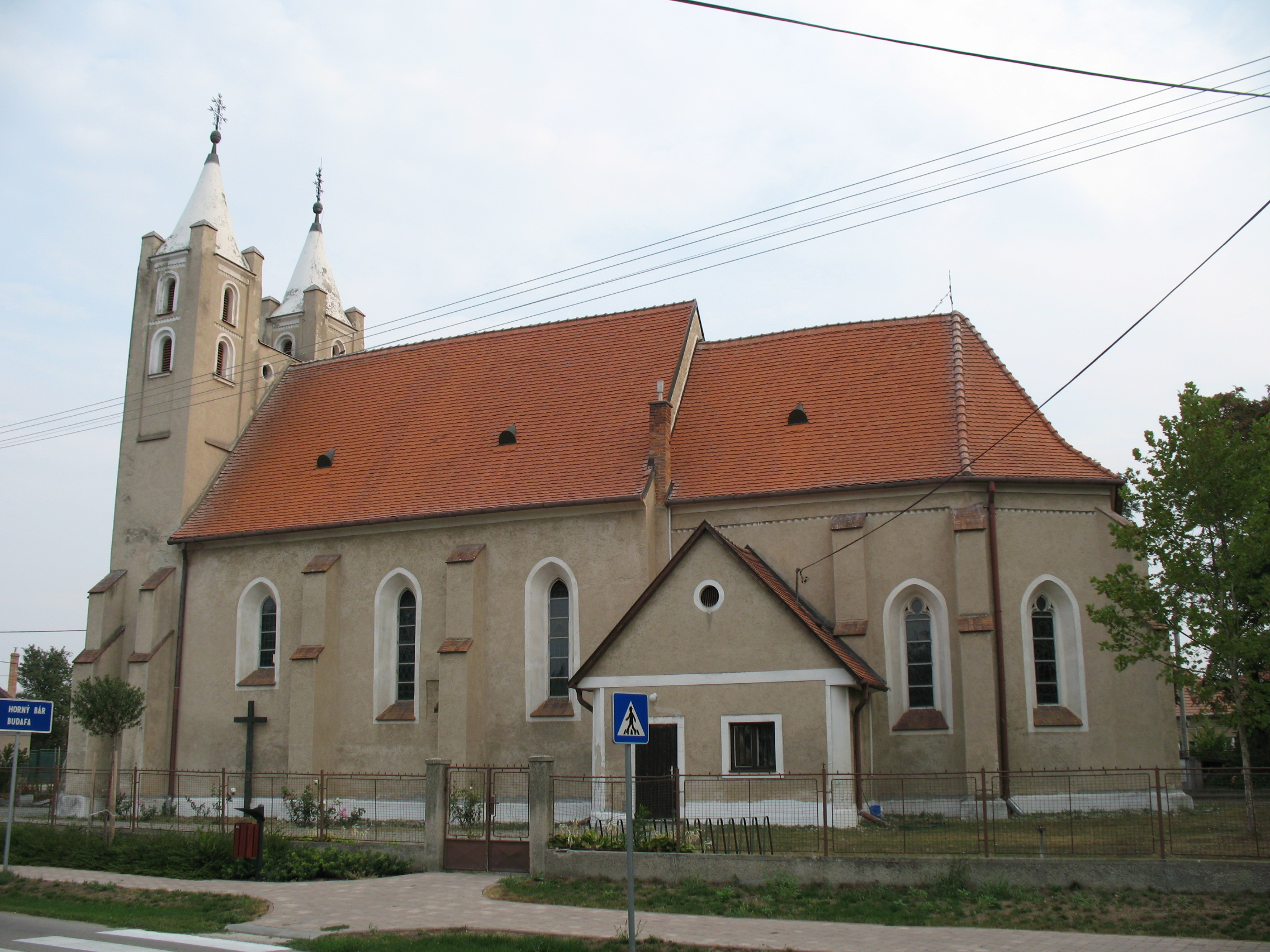 templom